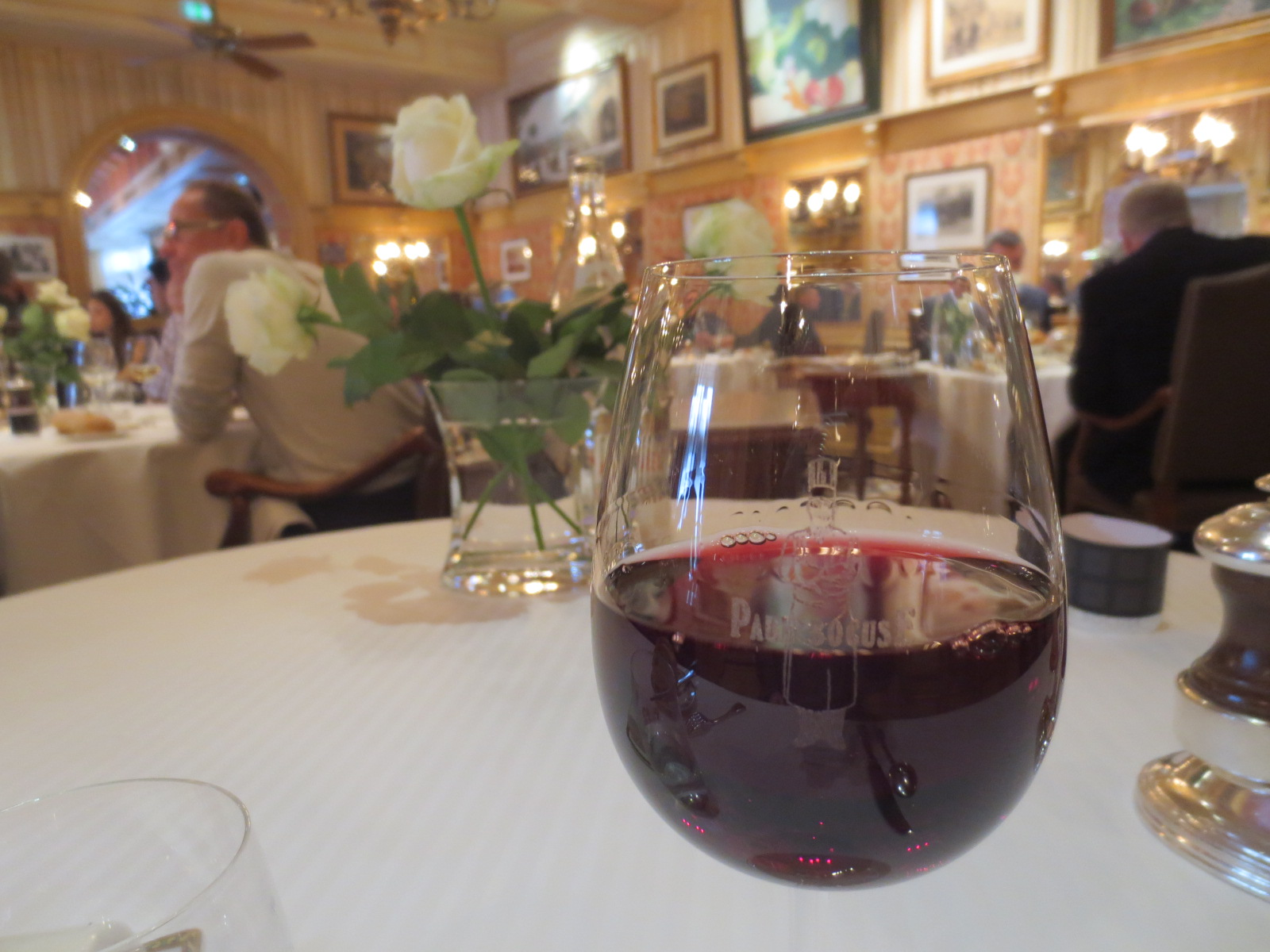 Verre gravé Paul Bocuse, de Côte-rôtie (AOC), à L’Auberge du Pont de Collonges